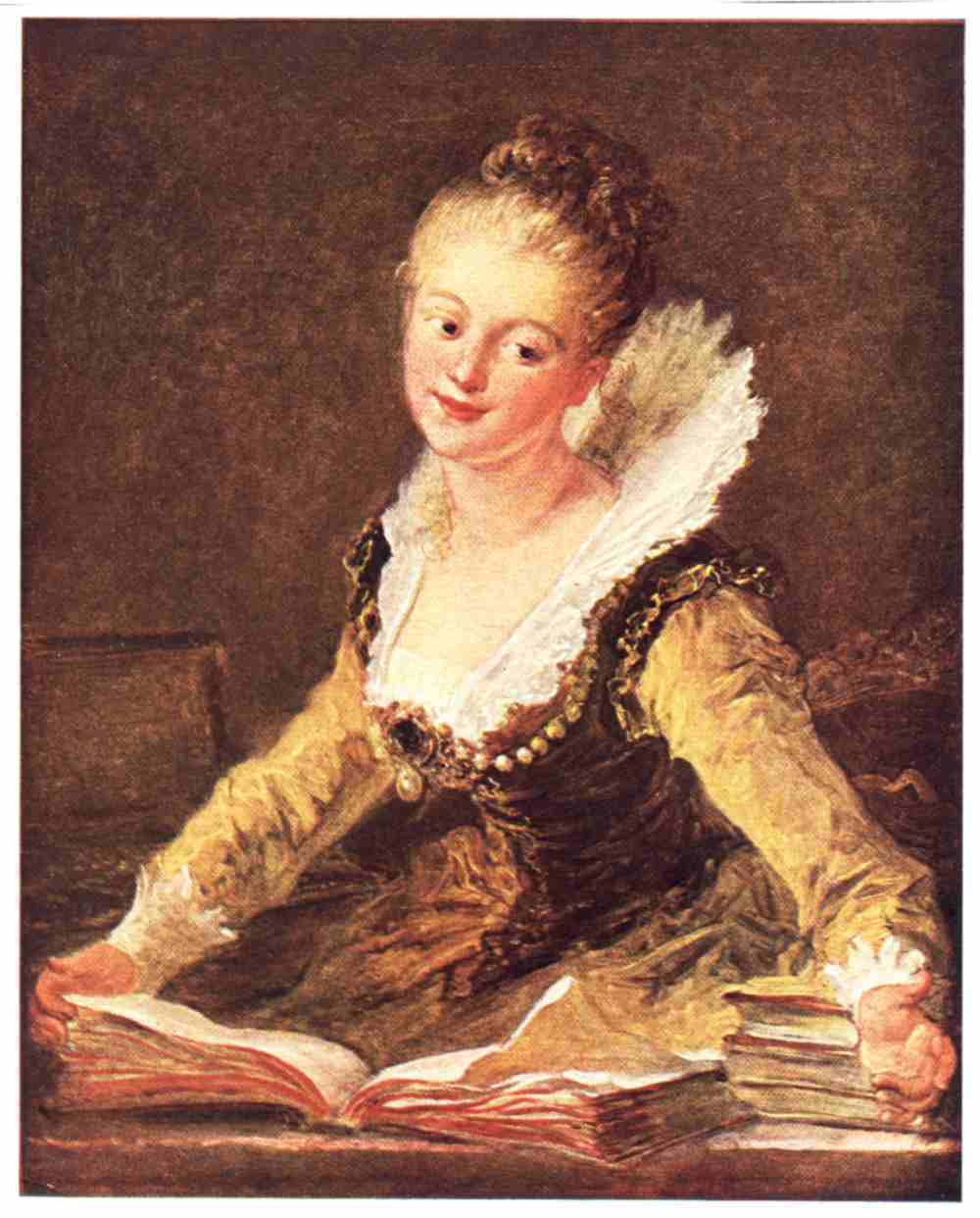 Jean-Honoré Fragonard : Madame Brillon de Jouy (1744–1824) – Anne-Louise née Boyvin d'Hardancourt épouse Brillon de Jouy Claveciniste réputée et compositrice, elle feuillette un cahier de musique devant un clavecin à double clavier. La toile, appelée « L'Étude » avant l'identification du sujet en 2011, avait été considérée comme une "allégorie de la musique" ou une des "figures de fantaisie", portraits d'amis et de clients de Fragonard. Le premier propriétaire de l'oeuvre fut probablement le Lyonnais Randon de Boisset. Legs du Dr. Louis La Caze, 1869.